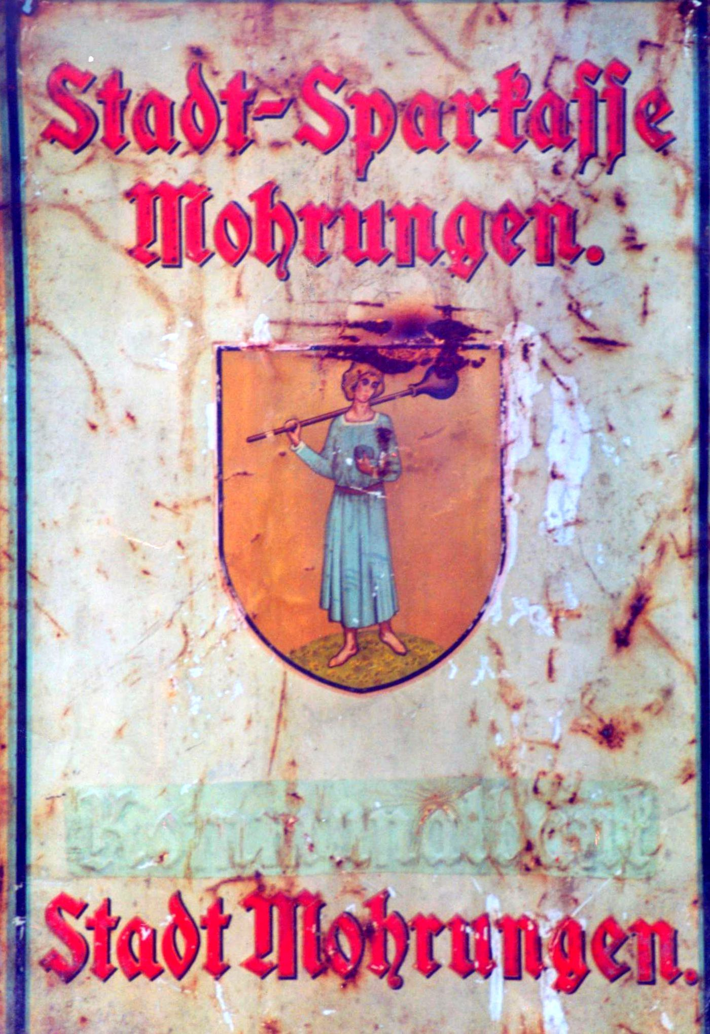 Tablica z herbem Morąga przez 1945